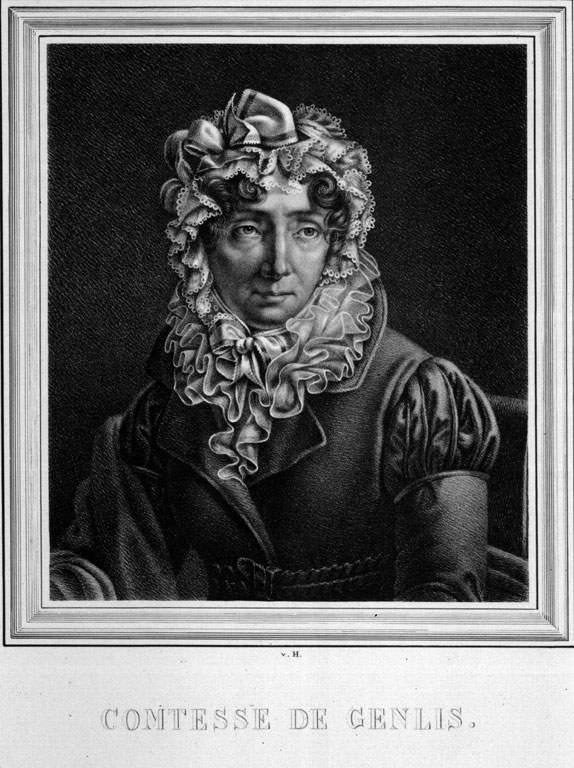 Félicité du Crest, comtesse de Genlis